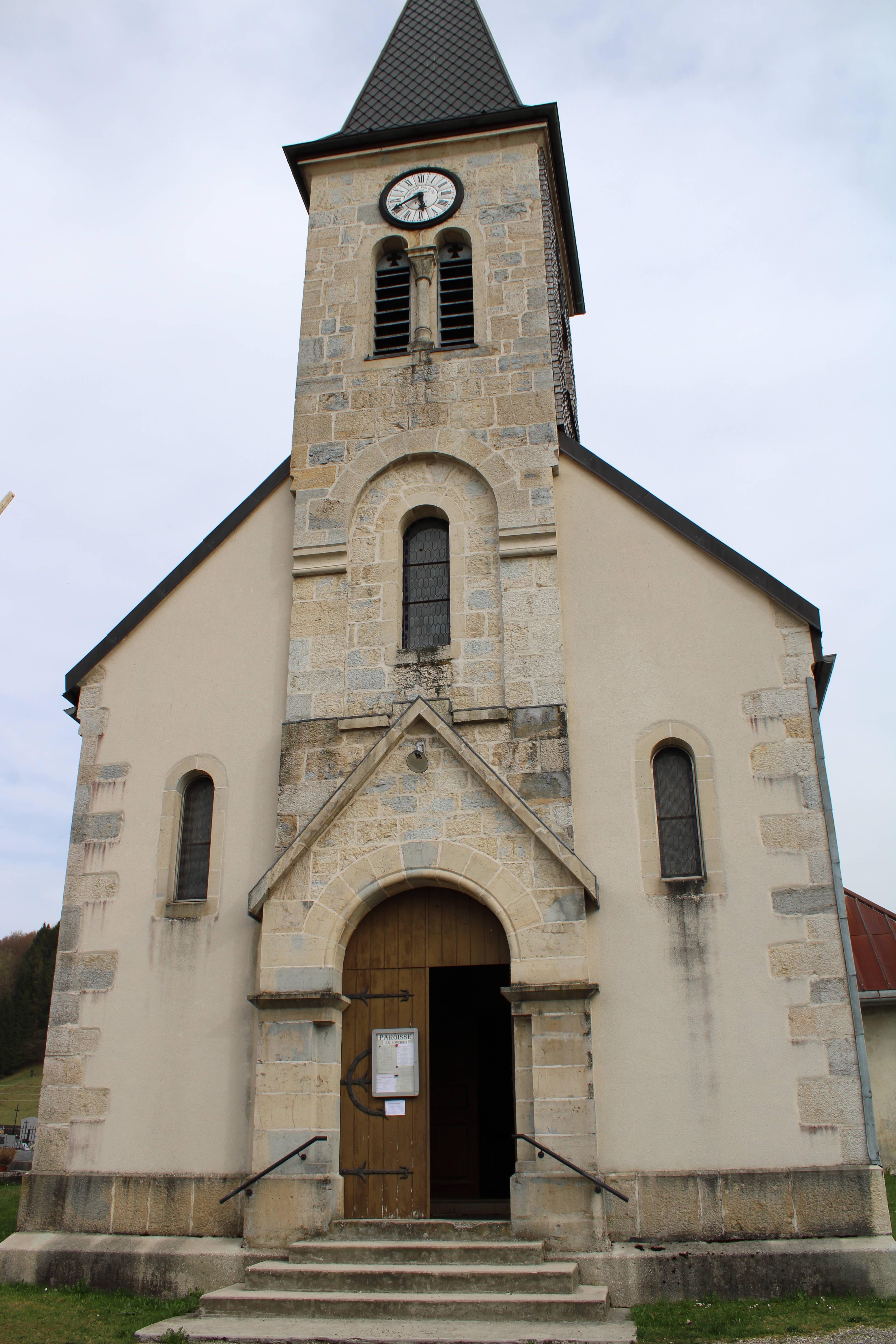 La façade de l'église.